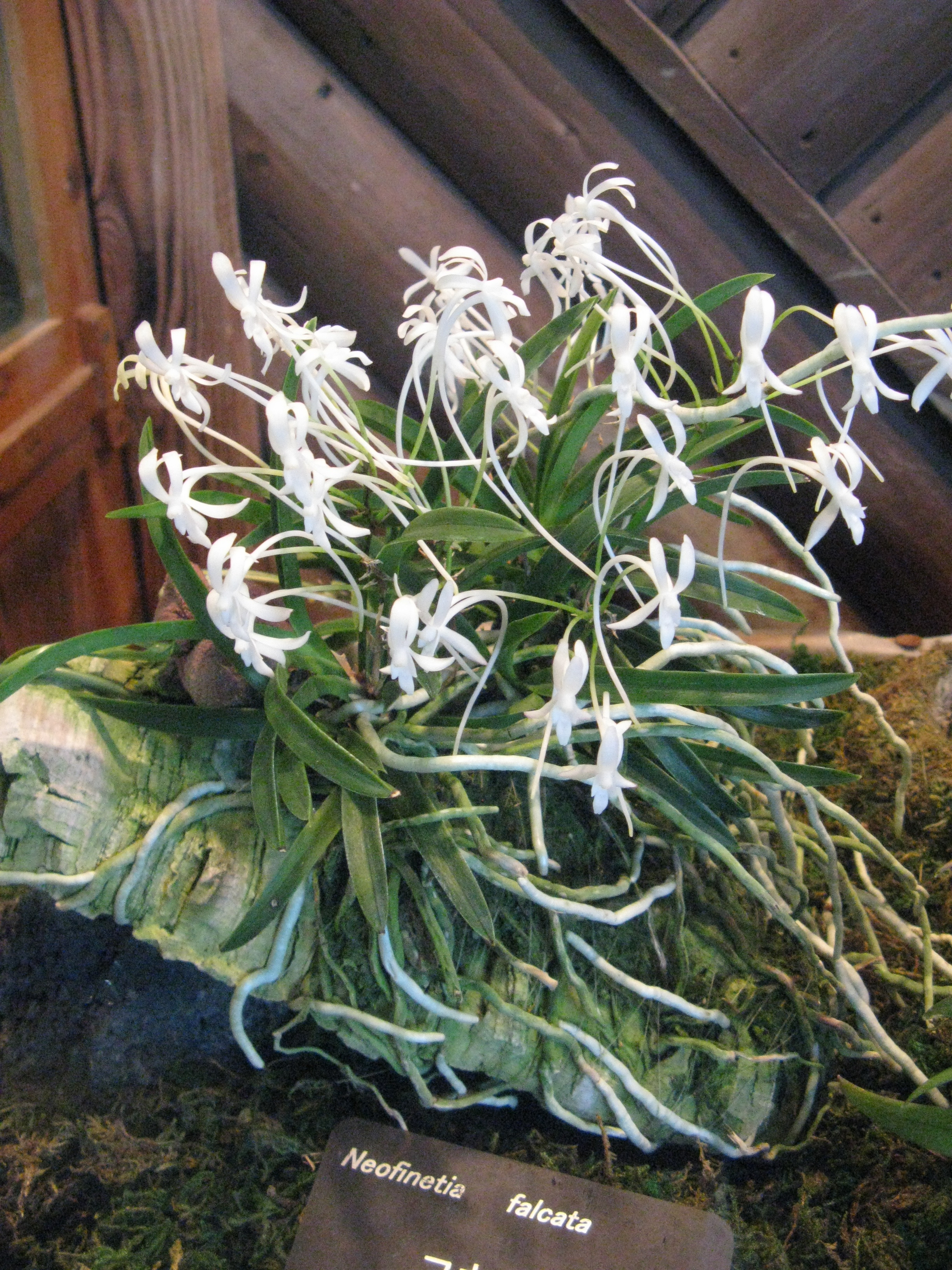 Scientific name Neofinetia falcata